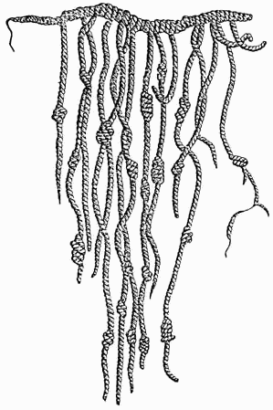 Quipu (Knotenschrift)